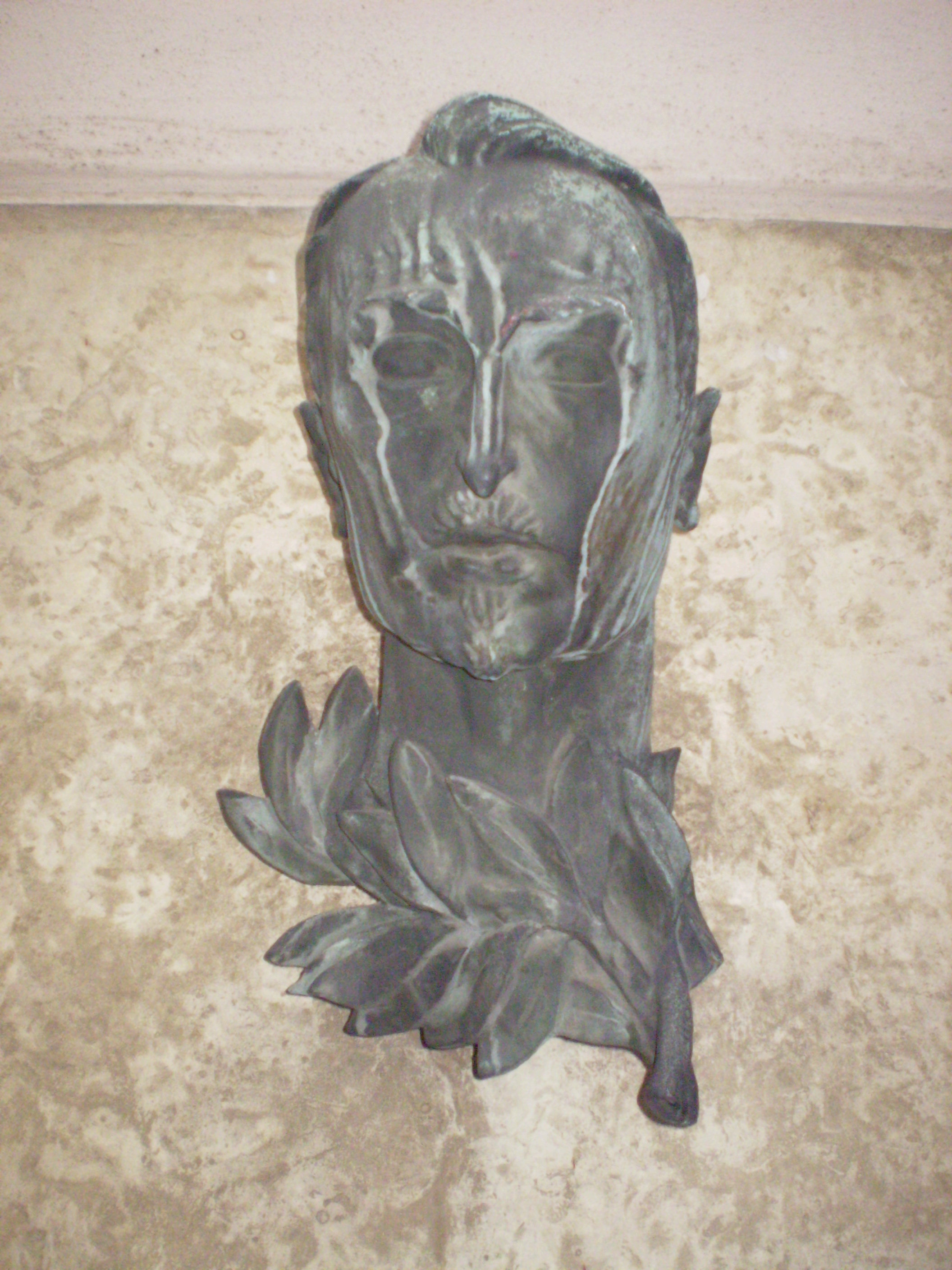 Busta Jiřího Mahena (detail z pamětní desky), ulice Solniční v Brně.